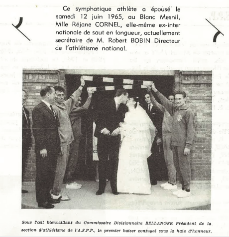 Mariage de Jacques dohen et Réjane Cornel à la mairie du Blanc Mesnil (93) le 12 juin 1965